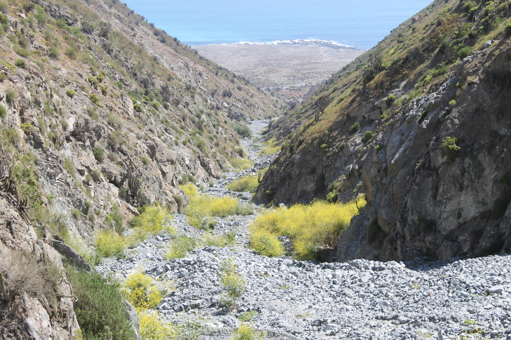 Quebrada El Medano, Paposo